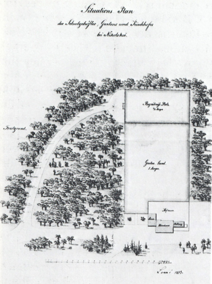 Lageplan des Friedhofs Nikolskoe, Gustav kloeber nach Lenné, 1837, SPSG Potsdam